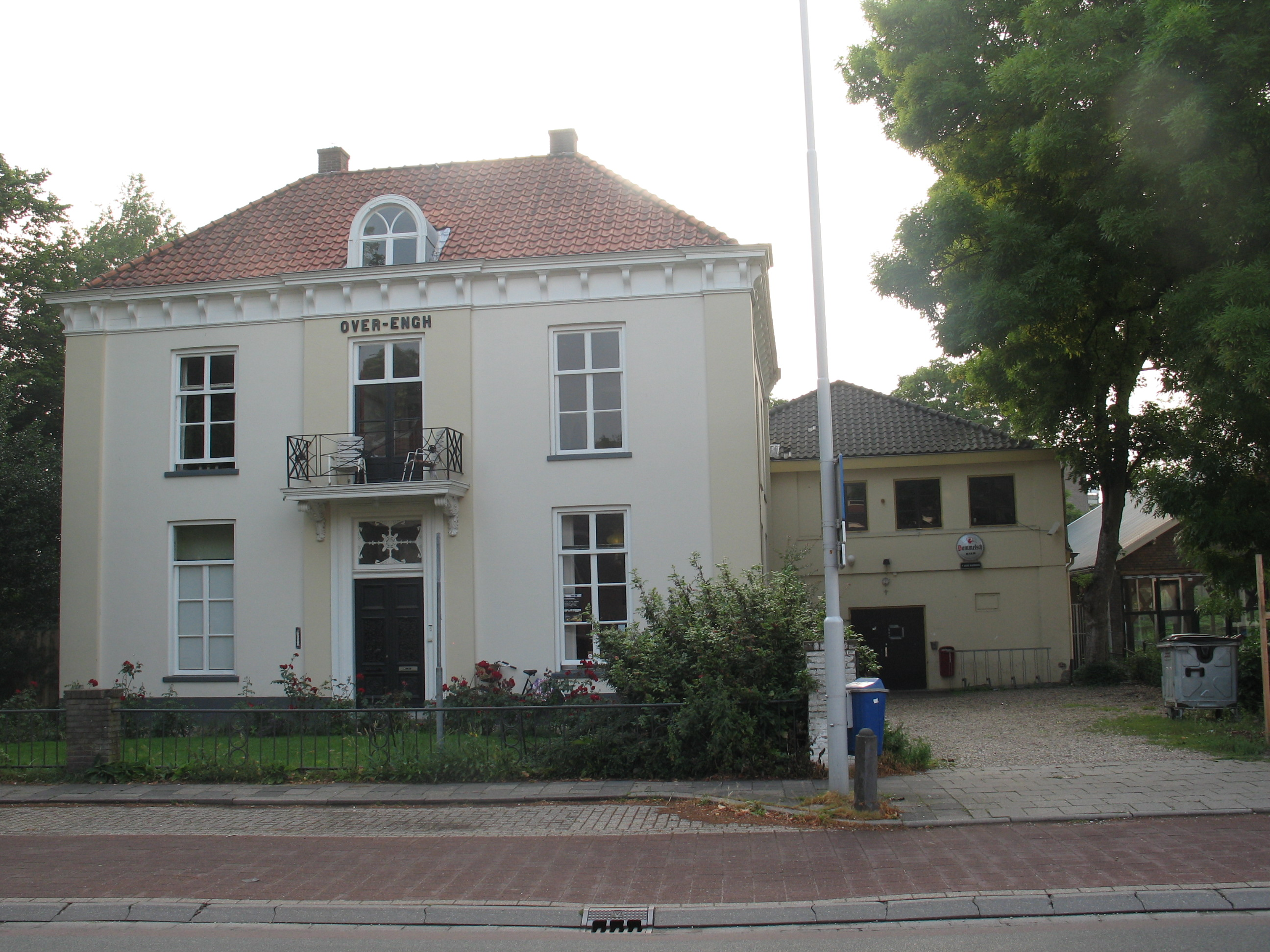 Wageningen, Churchilweg 1-3, Rijksmonument